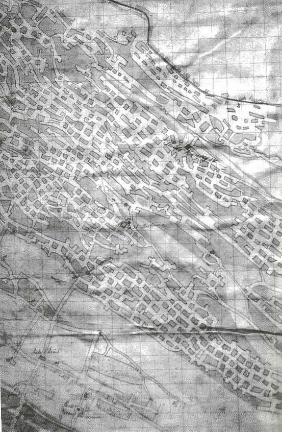 Plan des travaux du puits Saint-Louis (Houillères de Ronchamp).